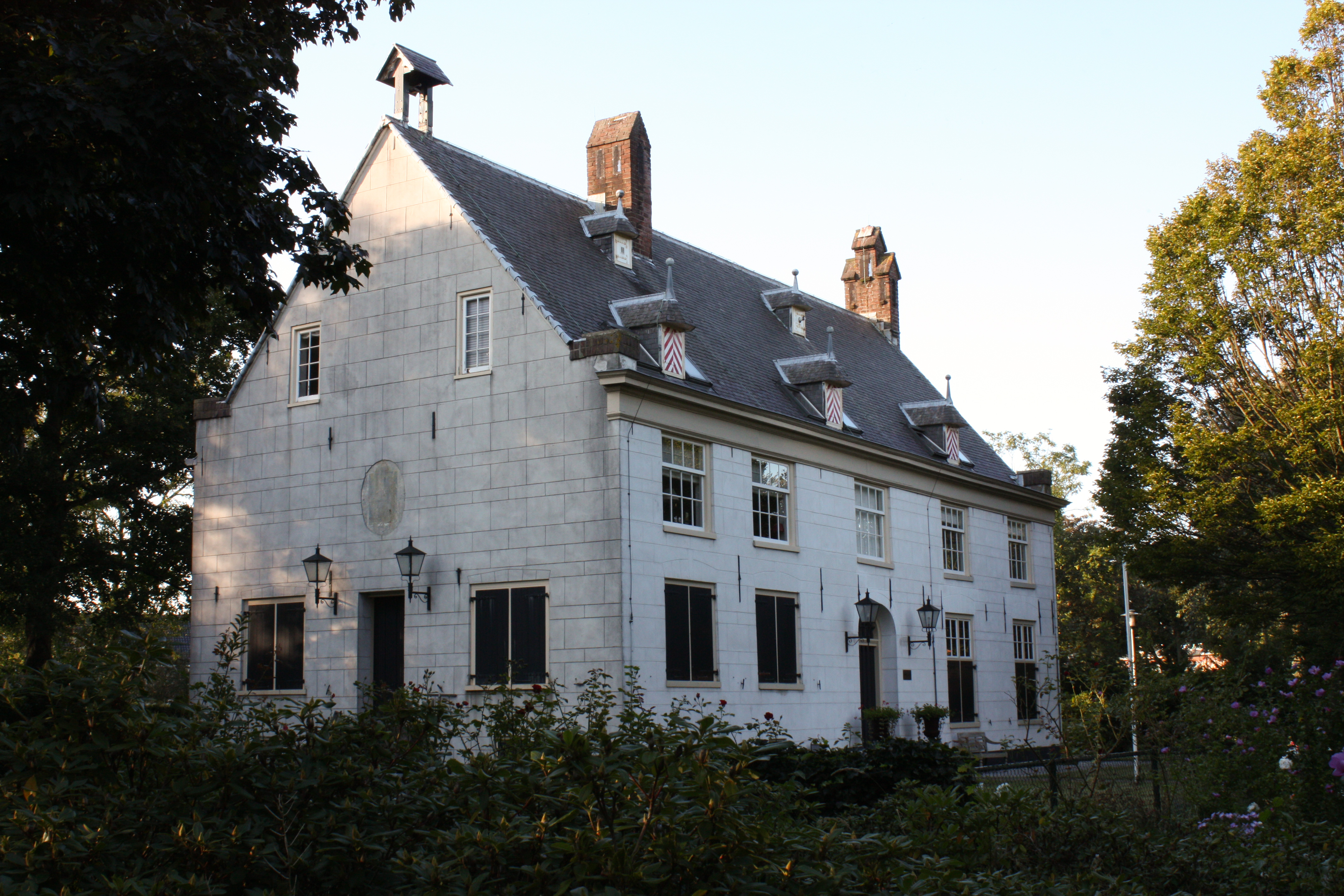 Huis te Zaanen, Haarlem